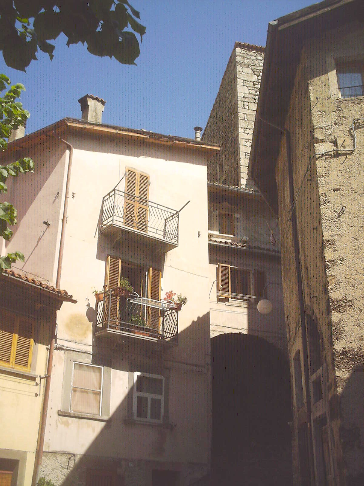 Zona dove probabilmente si è sviluppato il nucleo originario Scanno